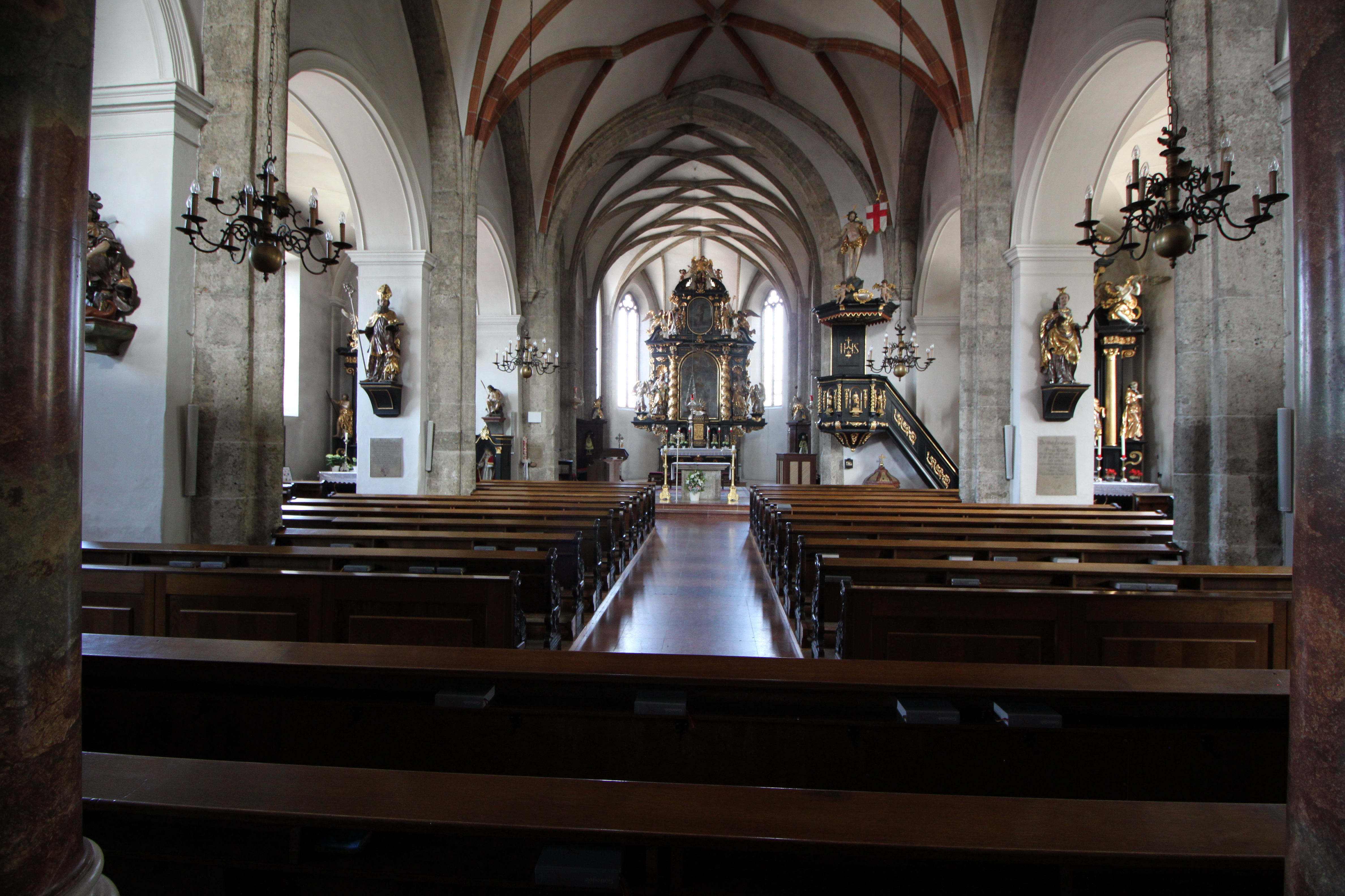 Kath. Pfarrkirche hl. Martin in Straßwalchen, im Mittelschiff des Langhauses zum Chor